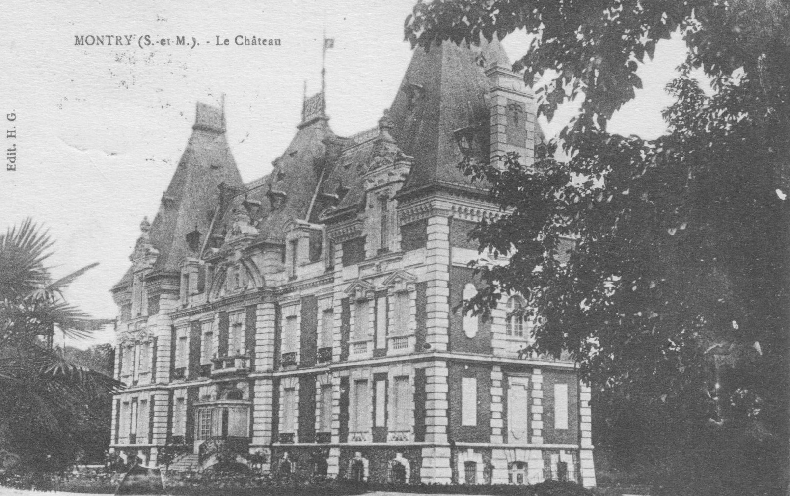 Château de Montry au début du XXe siècle